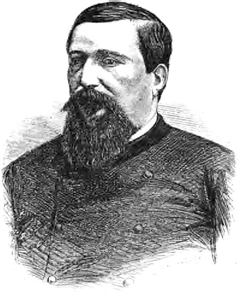 Le_prince_Pierre_Napoléon_Bonaparte